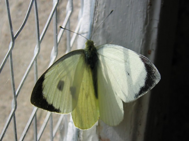 Großer Kohlweißling Pieris brassicae